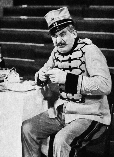 Josef Norman i Kyska Susanna